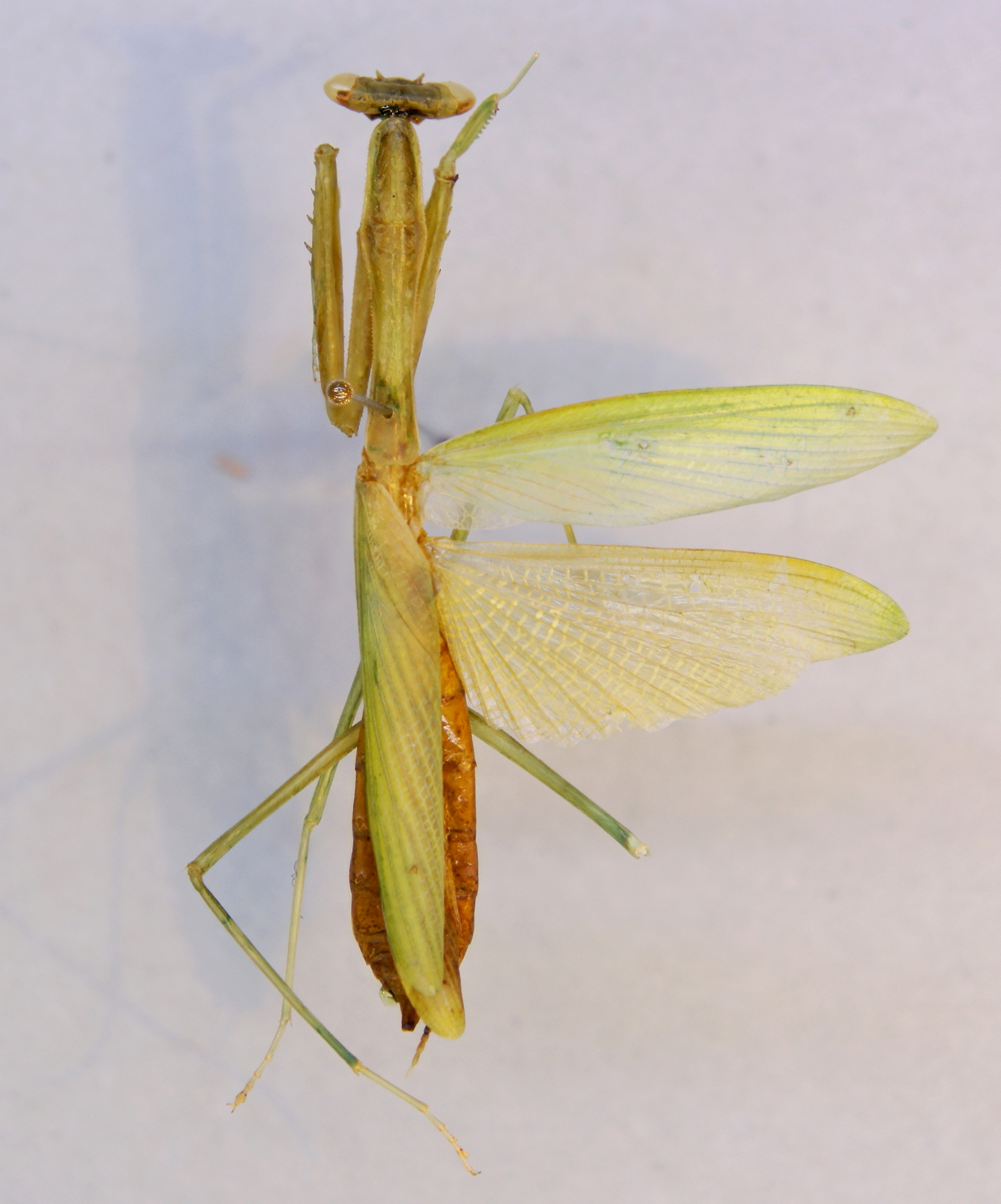 Miomantis paykullii (Stål,1871) ♀ Herkunft: Mali, Bamako